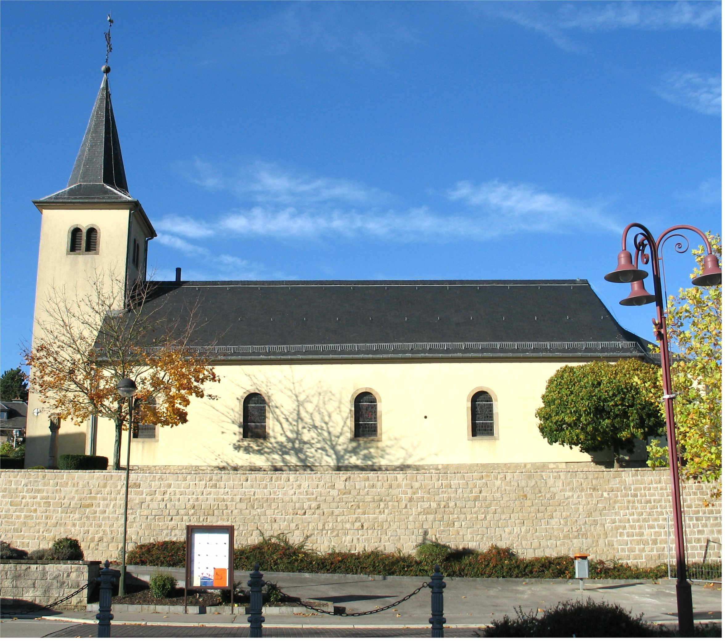 D'Kierch vun Holzem